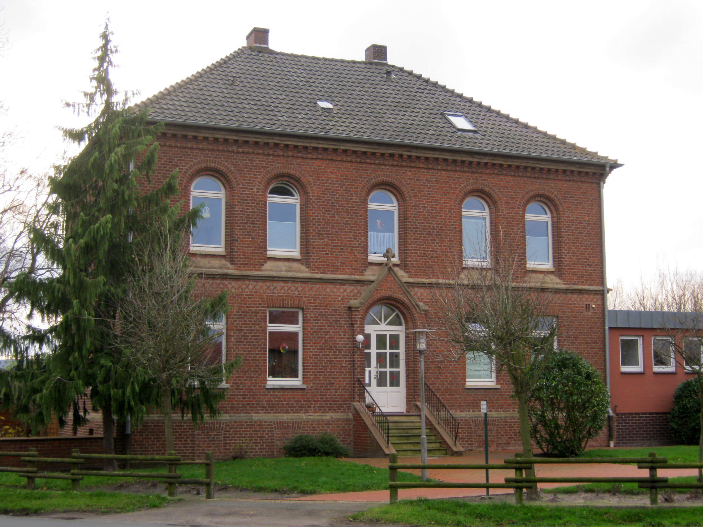 Das Pfarrhaus in Isenstedt (Ortschaft der Stadt Espelkamp) aus nördlicher Richtung, erbaut von Wilhelm Moelle 1880–1882. This image shows a heritage building in Germany, located in the North Rhine-Westphalian city Espelkamp (no. 15).